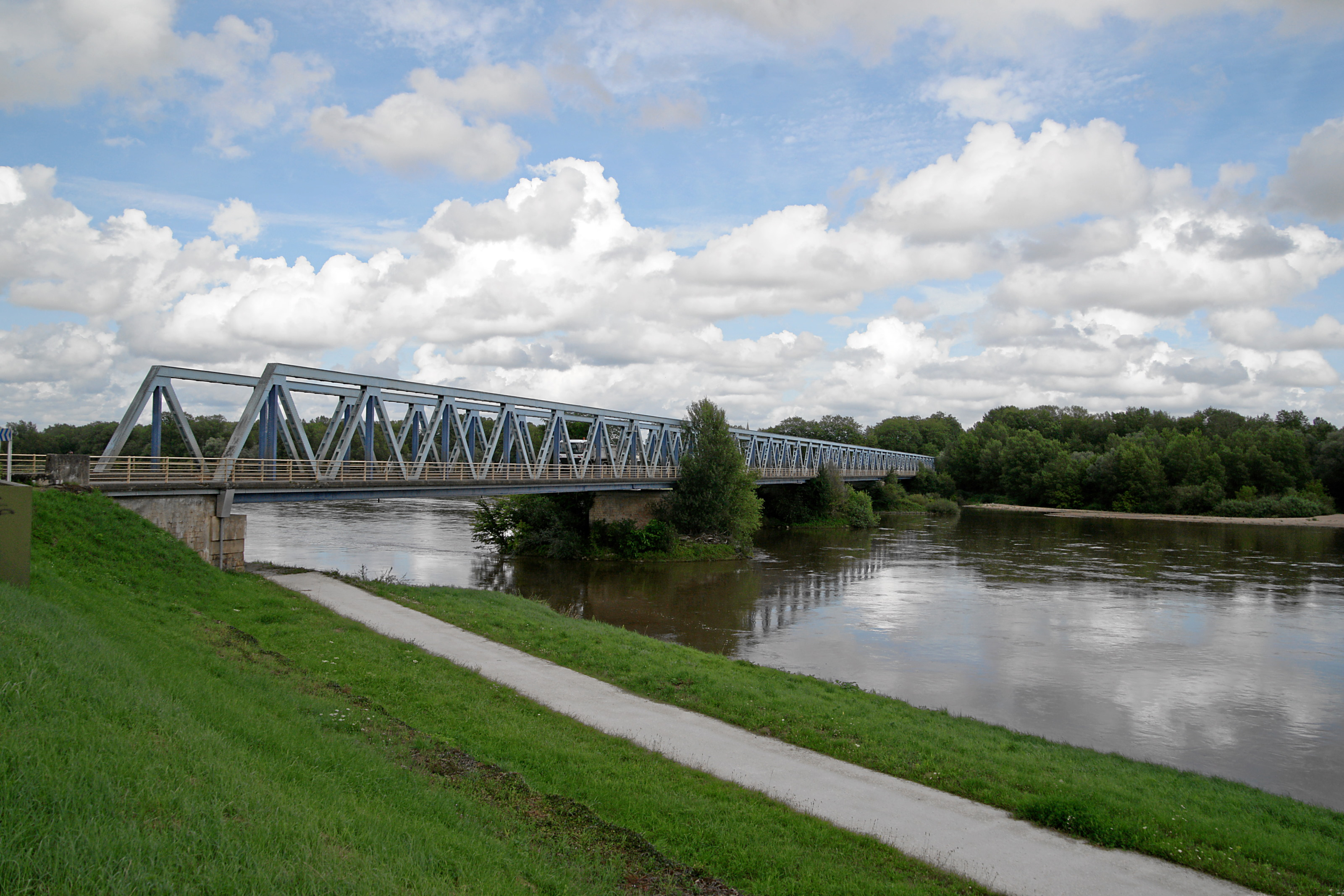 Fourchambault: Brücke der D40